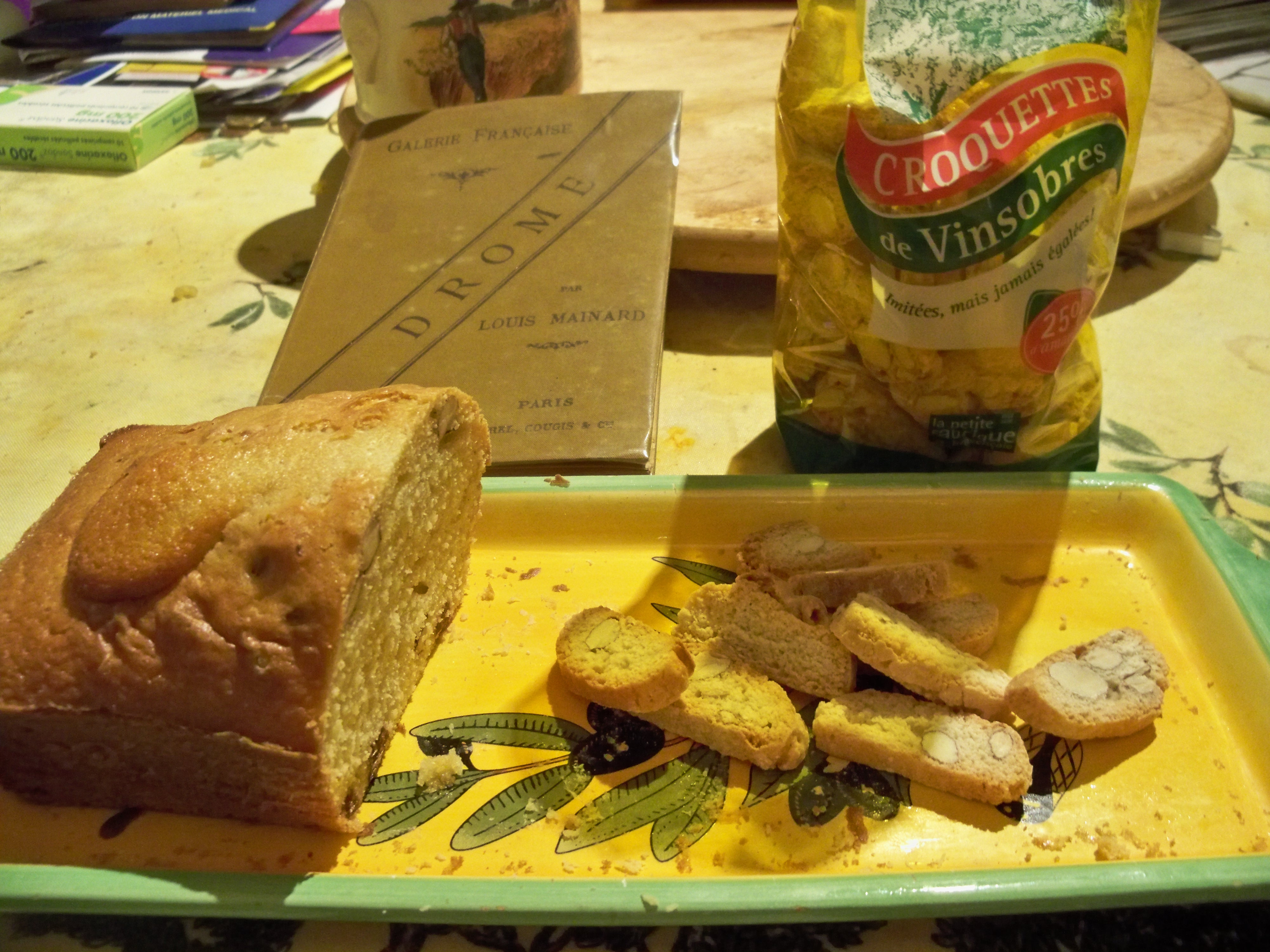 Petits gateaux les croquants de Vinsobres, dans la Drôme provençale